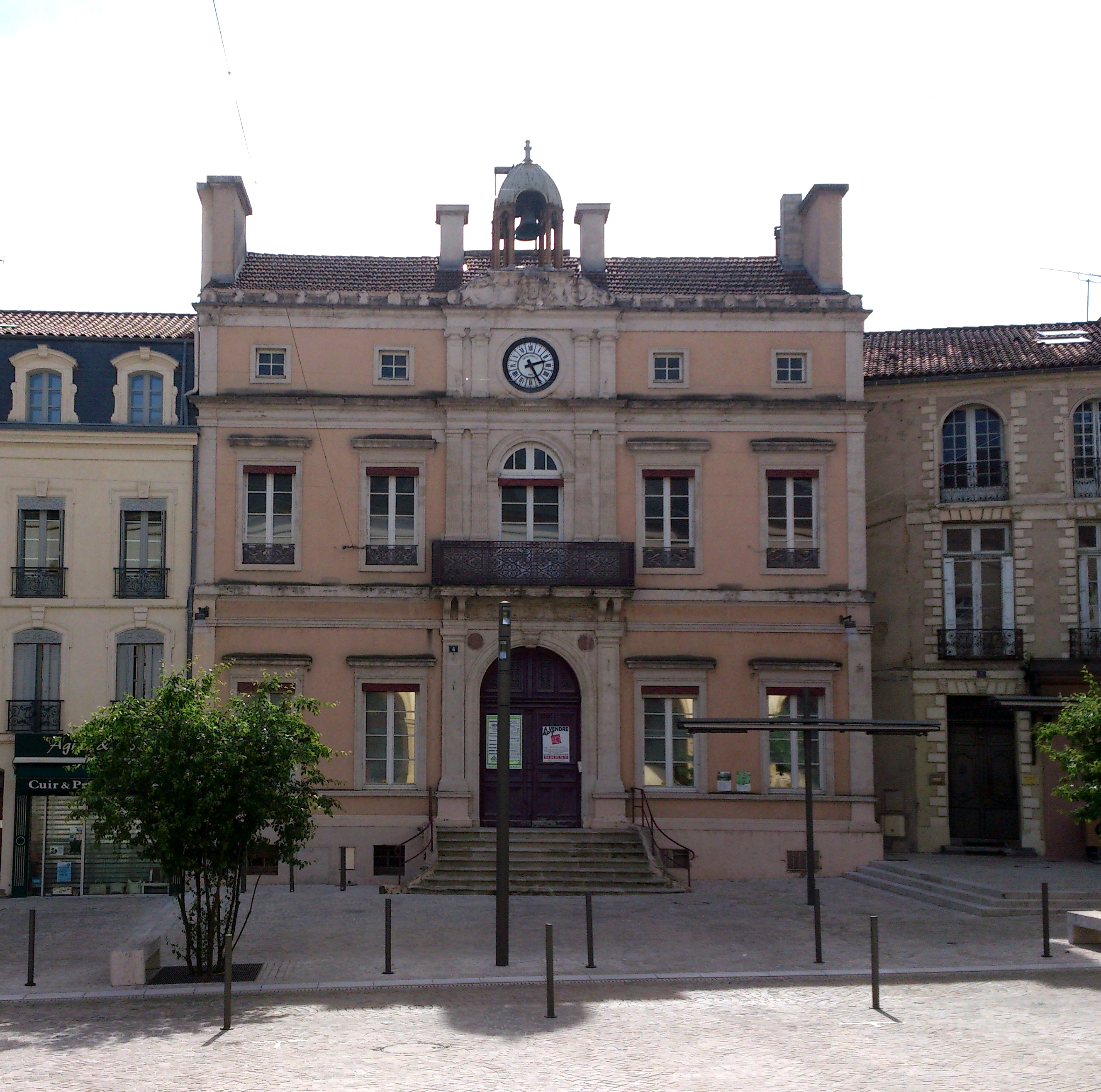 Fomer public library and town hall of Mont-de-Marsan, France.